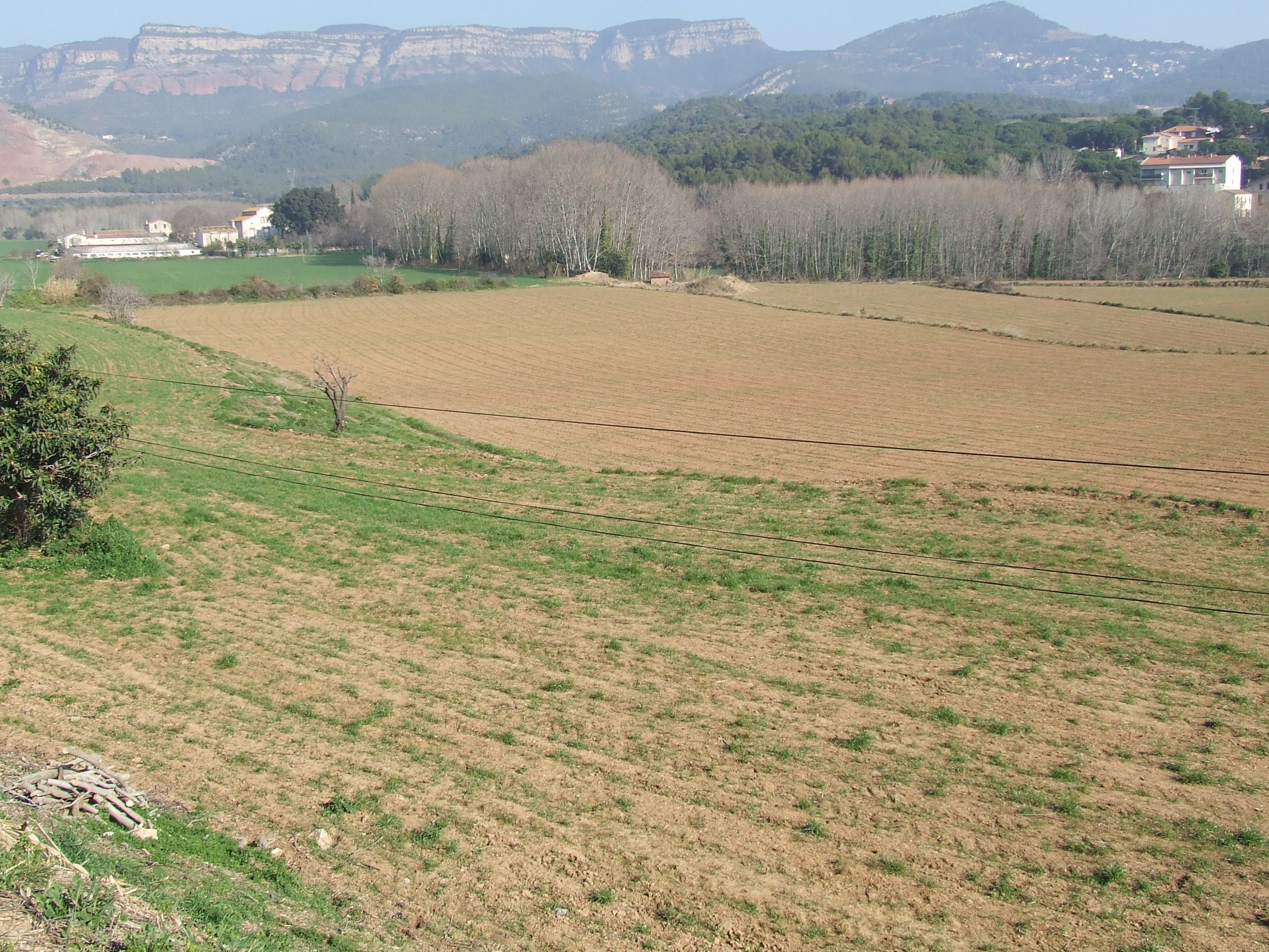 La Quintana de Can Noguera (Bigues, Bigues i Riells, Vallès Oriental)